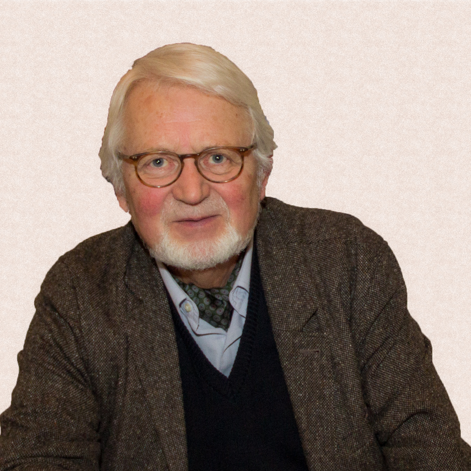 Universitätsprofessor i.R. Dr. phil. Karl Neumann, Geboren am 17.10.1939 in Holzminden